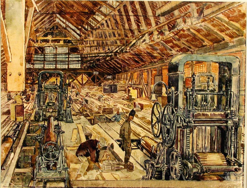 Фогелер Г. Лесопильный завод. 1933 -1934 гг.